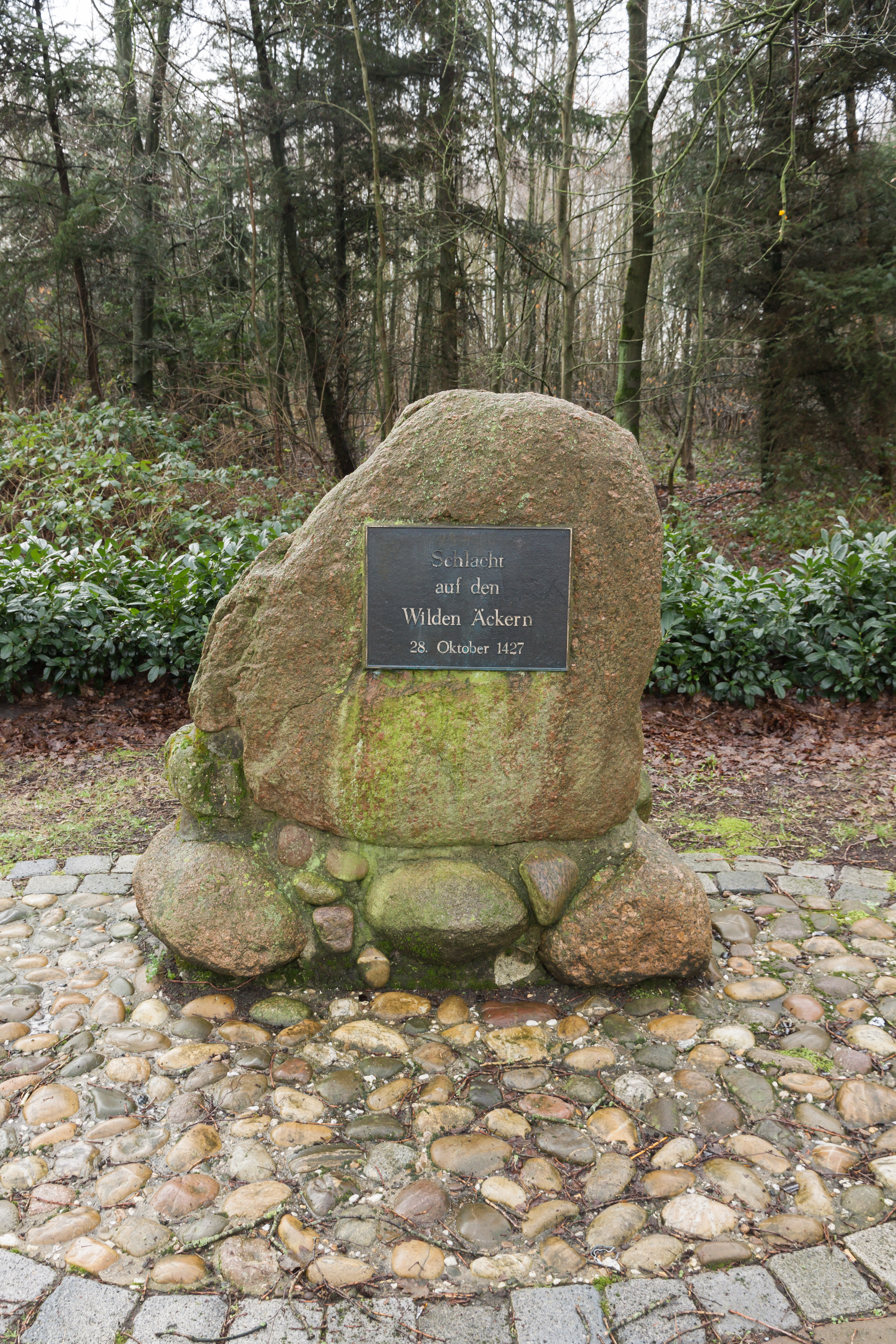 Gedenkstein zur Erinnerung an die Schlacht auf den Wilden Äckern